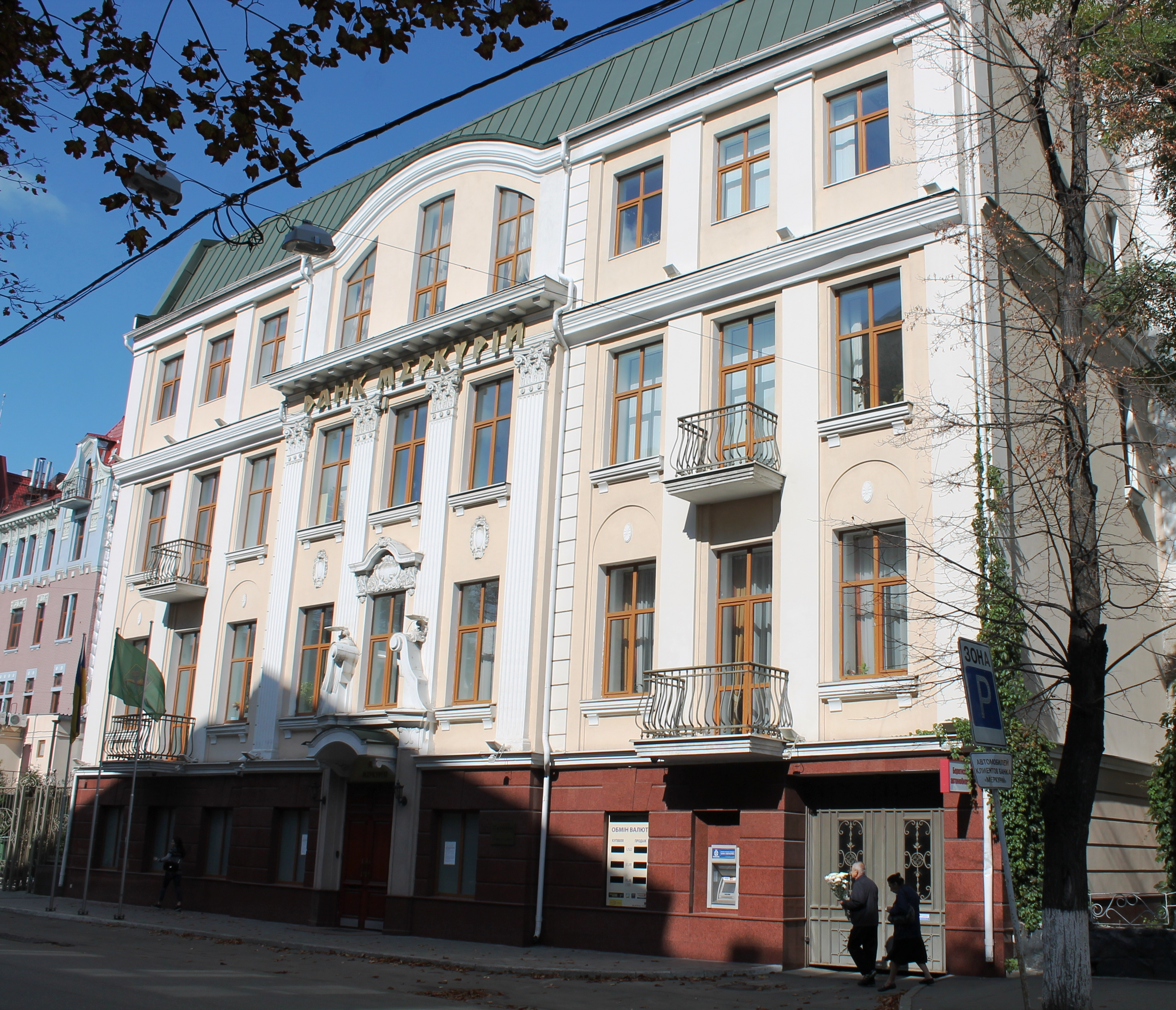 Приватна лікарня, Харків, вул. Петровського, 23